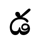 ддакараму